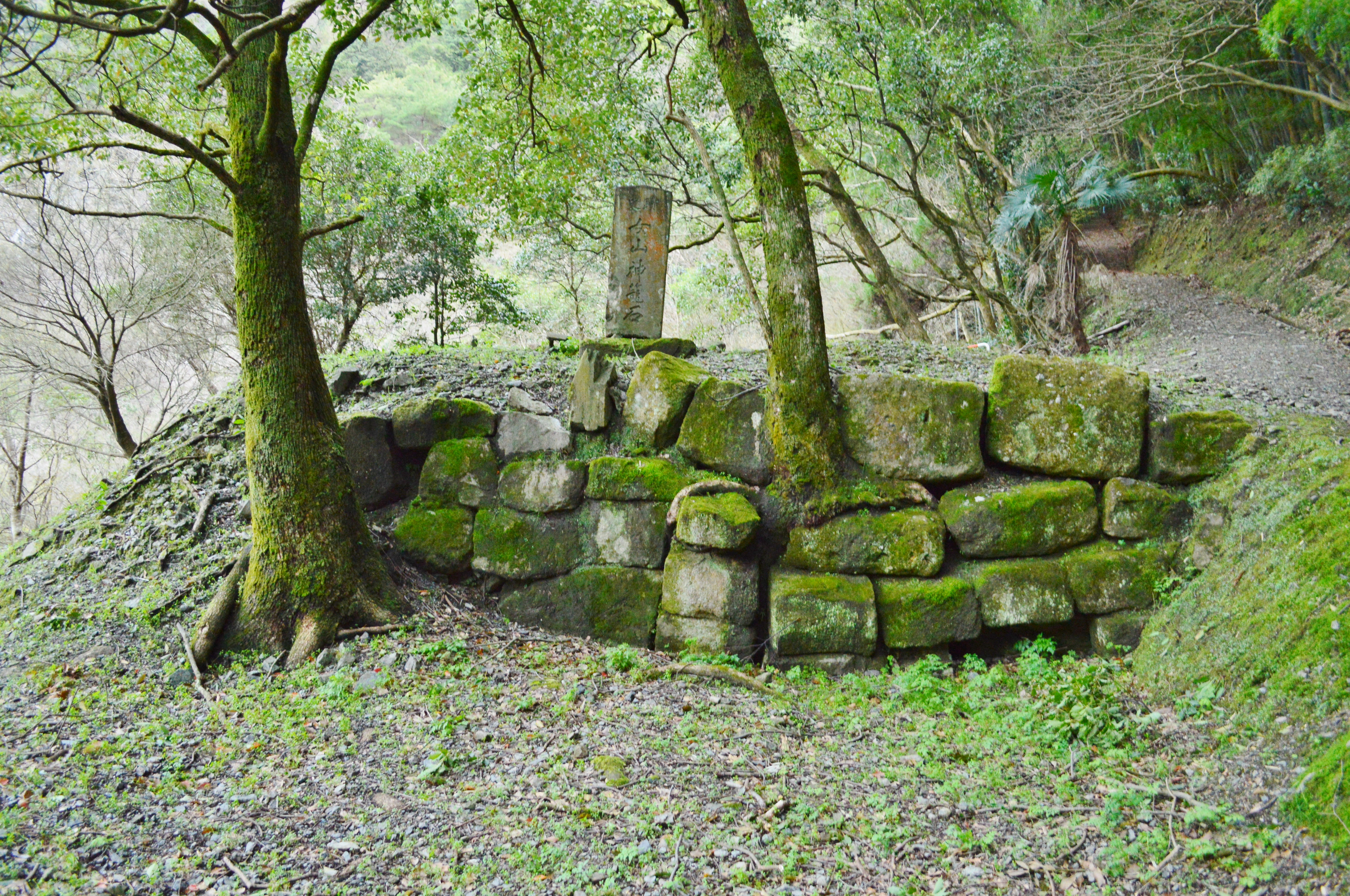 女山神籠石 産女谷水門